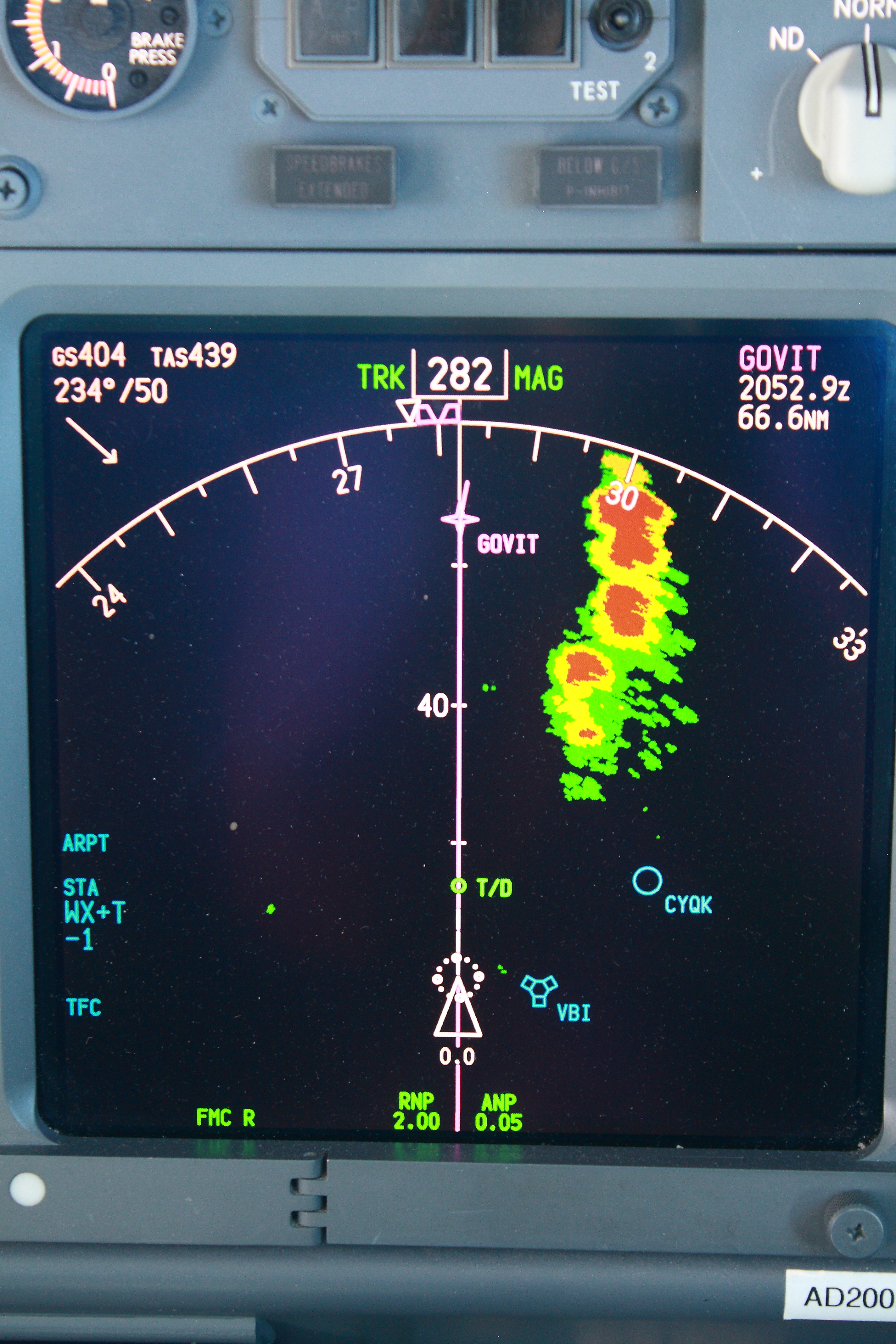 We're enroute to Winnipeg here.